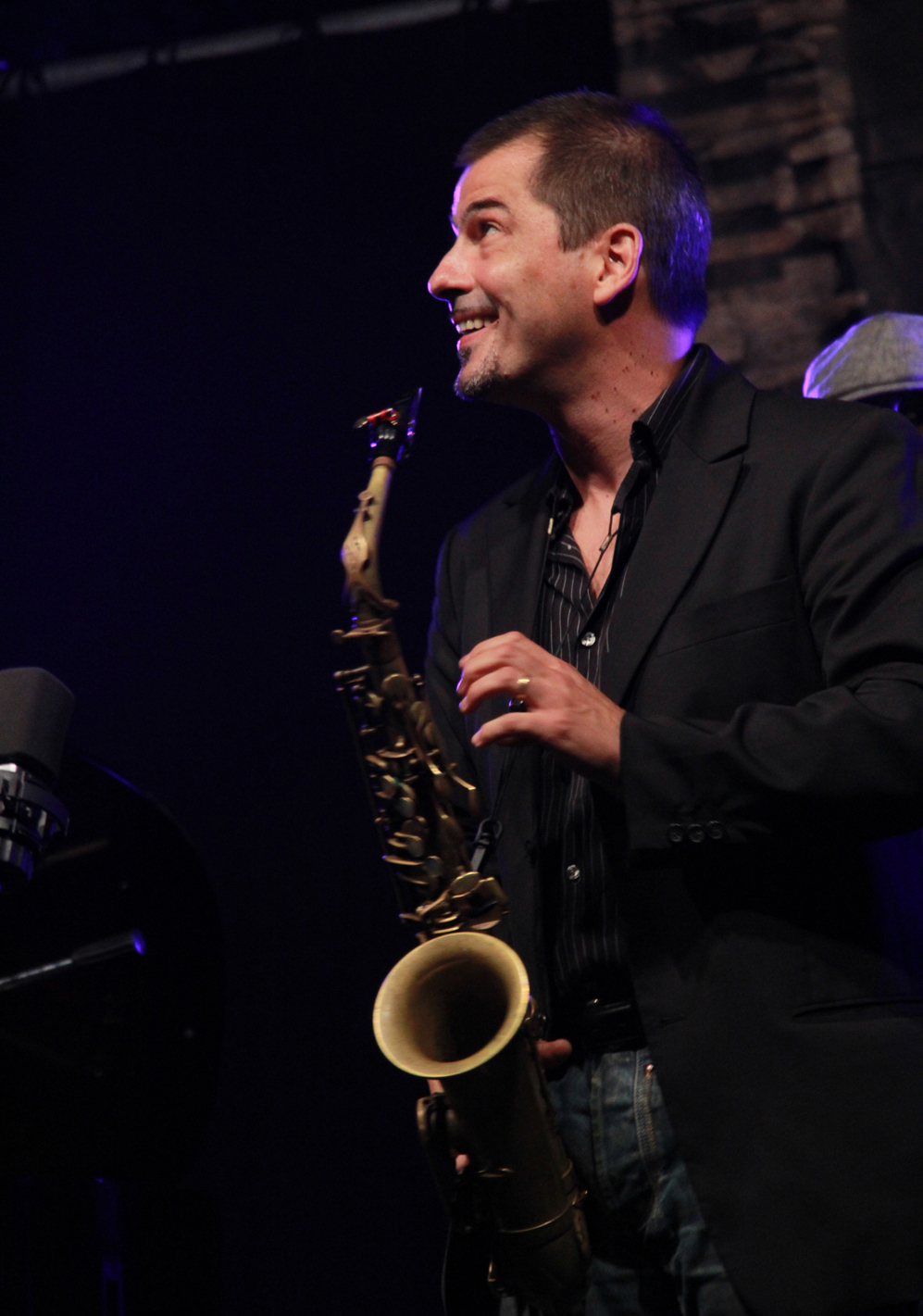 Rosario Giuliani @Pozzuoli Jazz Festival 2012, Vulcano Solfatara - Ph. Marina Sgamato